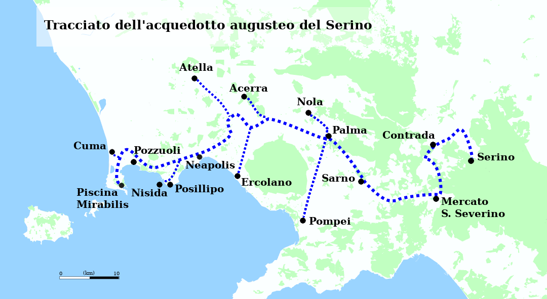 Tracciato dell'Acquedotto augusteo del Serino. Le diramazioni sono segnate con tratti meno spessi. This map of Campania was created from OpenStreetMap project data, collected by the community. This map may be incomplete, and may contain errors. Don't rely solely on it for navigation.